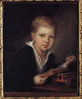 Оболенский Михаил Андрееевич (ребенком, ок. 1812)